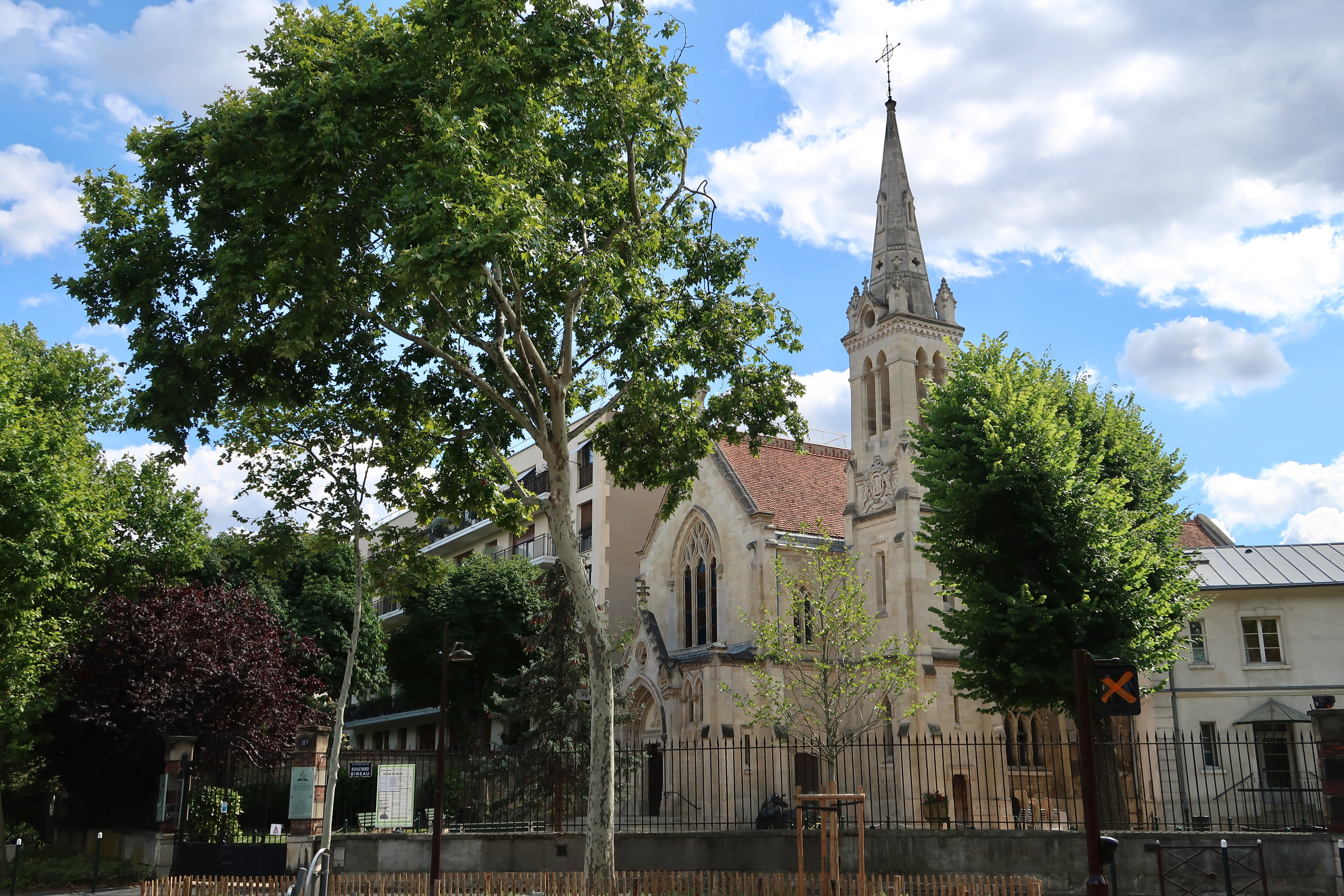 Église adventiste du 7e jour à la tombée de la nuit, au croisement du boulevard Bineau et du boulevard Victor-Hugo, à Neuilly-sur-Seine (Hauts-de-Seine).